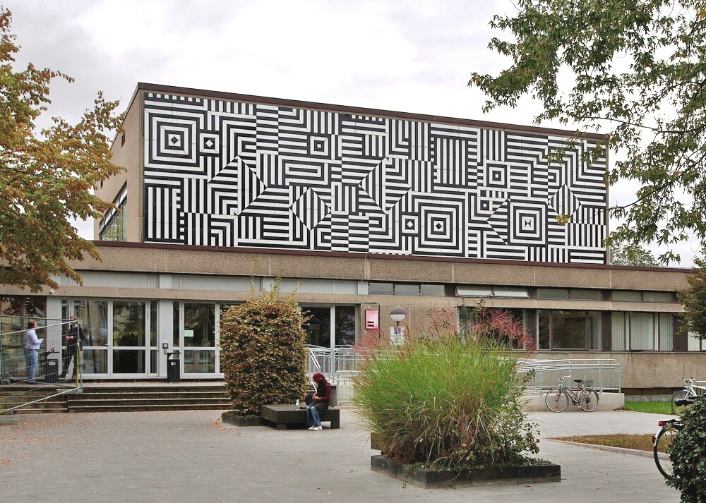 Juridicum Bonn, Adenauerallee 24–42, Bonn-Südstadt